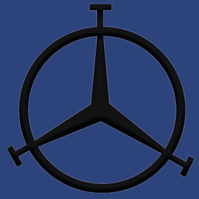 Actual hierro de la ganadería brava de Vegahermosa.